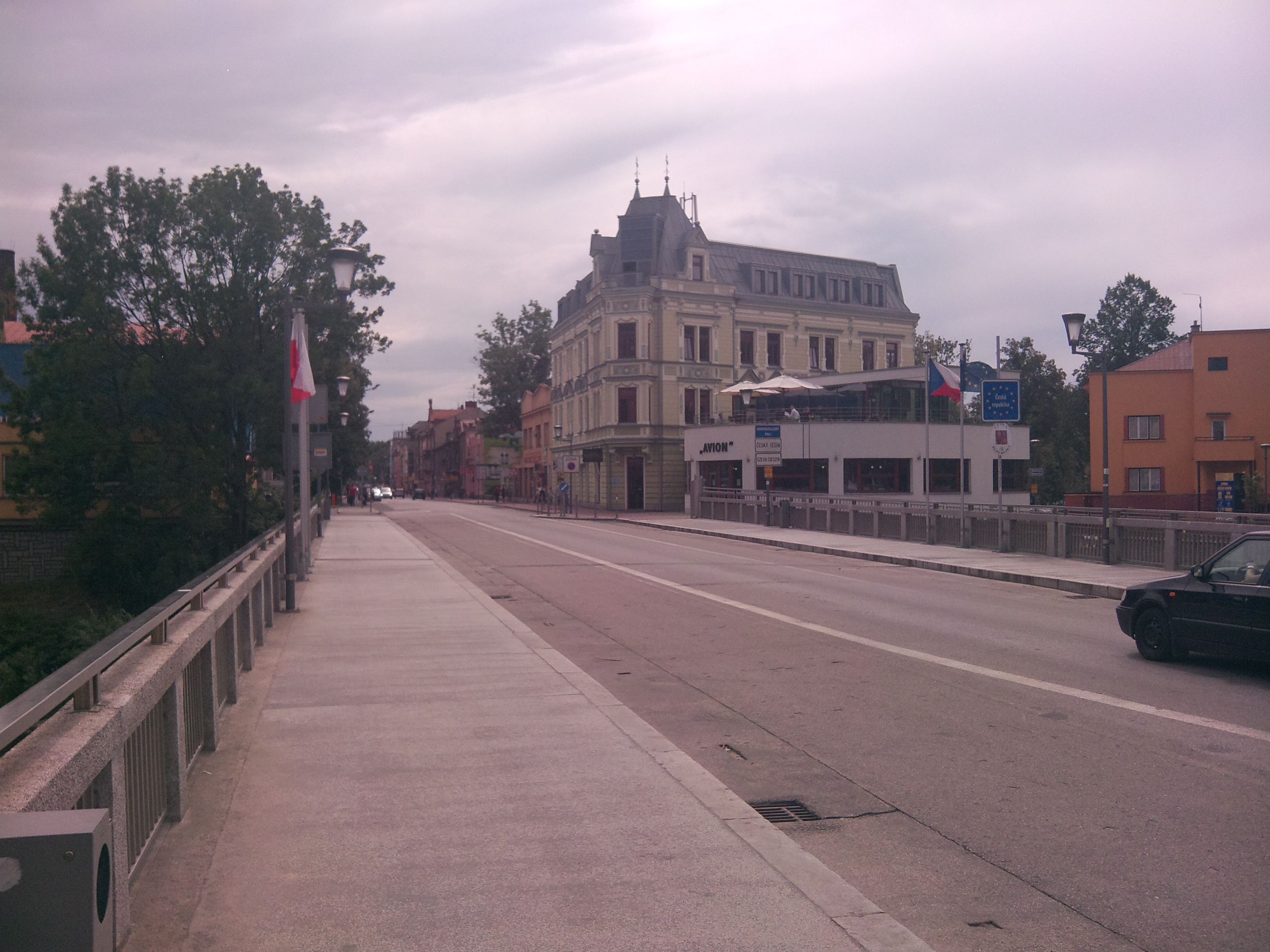 Przejście graniczne pomiędzy polską miejscowością Cieszyn oraz czeską miejscowością Český Těšín.